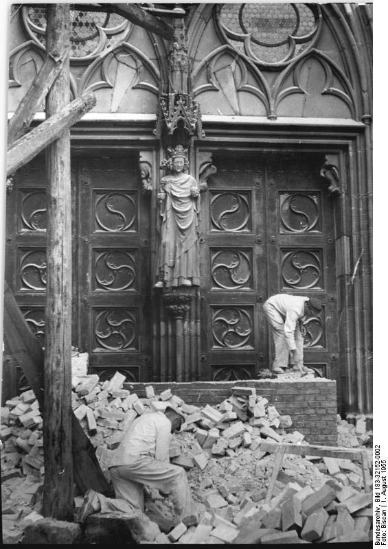 Zentralbild-Biscan Wjt-Ho 2 Motive 1.8.1955 Schutzmauer hielt Die Wiederinstandsetzung des durch amerikanische Bomben schwergeschädigten Magdeburger Doms macht grosse Fortschritte. In wenigen Wochen kann das kulturhistorische Baudenkmal, das in diesem Jahr 1000 Jahre alt wird, freigegeben werden. UBz, Seit 1943 war diese Statue hinter einer Schutzmauer den Blicken aller entzogen. Mit grosser Vorsicht wurde jetzt die Mauer abgetragen, hinter der das Abbild Kaiser Otto I. die letzten Kriegs- und Nachkriegsjahre geborgen war.